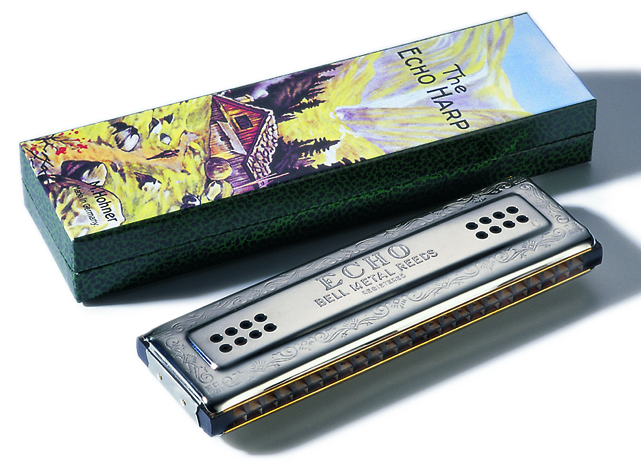 2-chöriges Tremolo Mundharmonika Modell -Echo Harp Wender- mit zwei Tonarten von Hohner. Im Vergleich zur Bluesharp (Richter-Harp), die einfachtönig ist, erkennt man hier sehr gut den geteilten Tonkanal (Steg) für den 2. Chor (Grundton/Tremoloton).